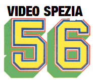 logo della Web Tv nata il 1 gennaio 2018